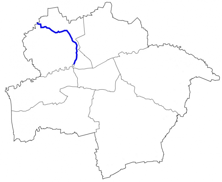 Das Bild zeigt den Verlauf des Nebenflusses der Lippe "Geinegge" auf dem Gebiet von Bockum-Hövel/Hamm/Nordrhein-Westfalen.